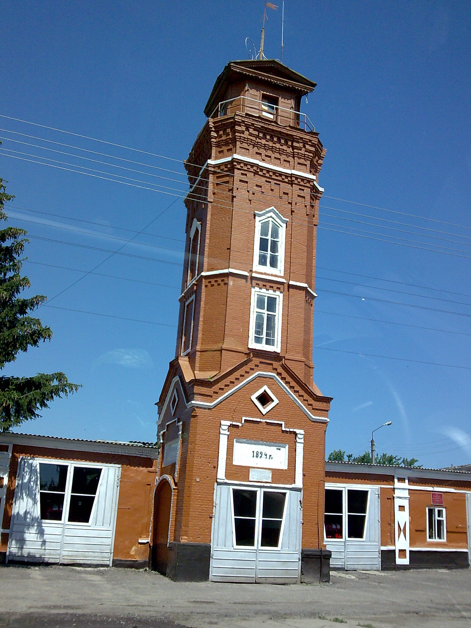 г. Трубчевск